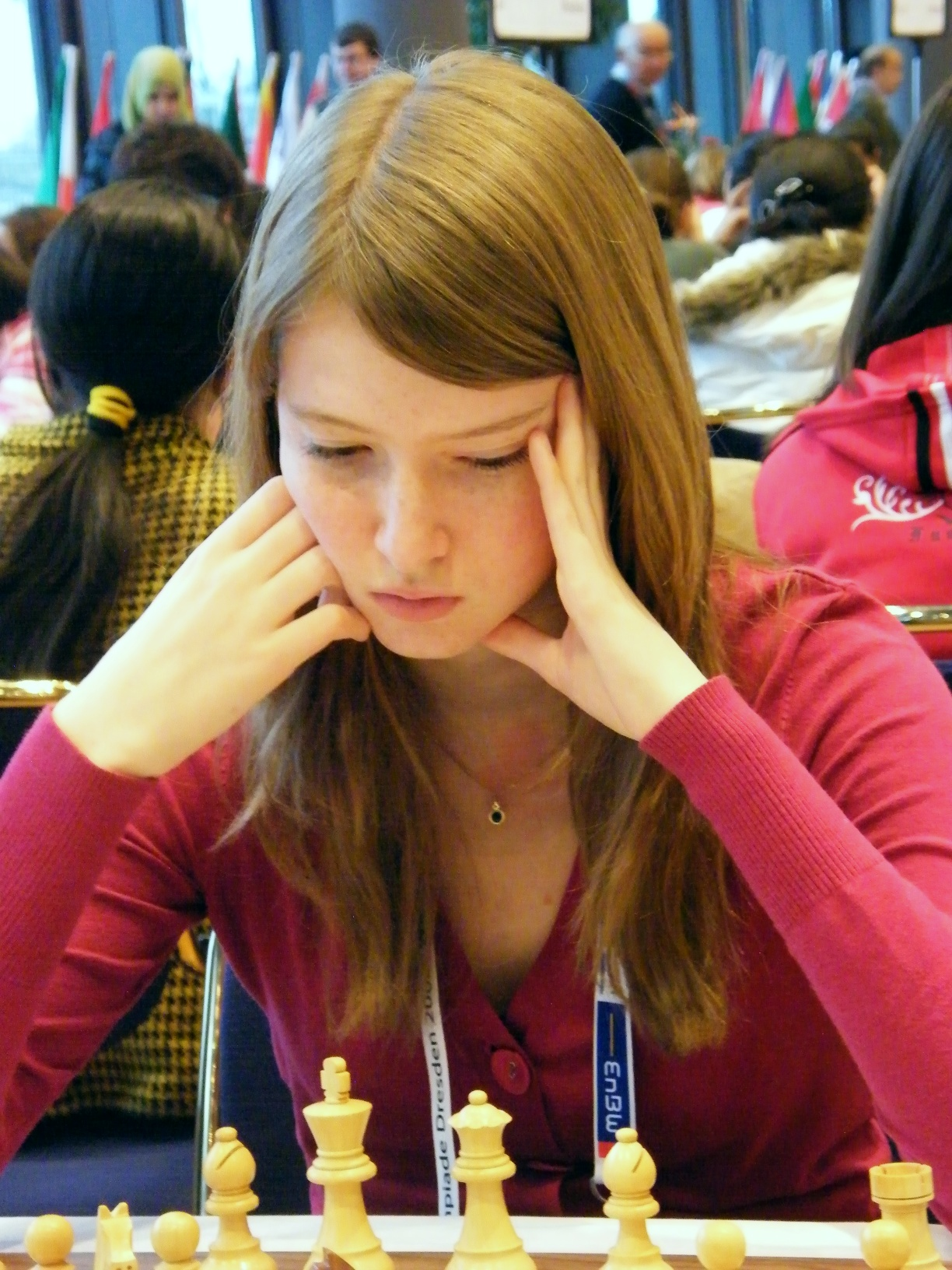 Hallgerdur Thorsteinsdottir bei der 38. Schacholympiade in Dresden 2008